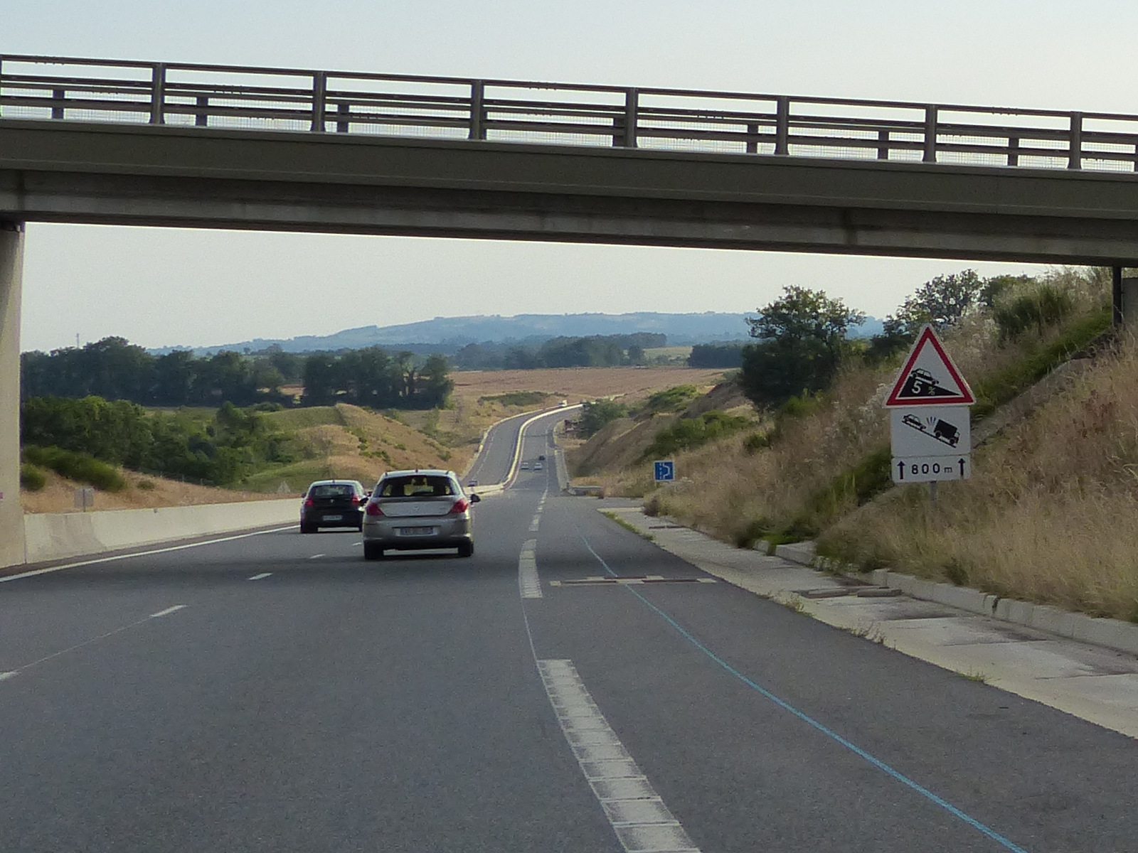 Panneau A16 5 % avec panonceaux M9j1 et M2 1000 m, RN88, Quins, Aveyron, France.